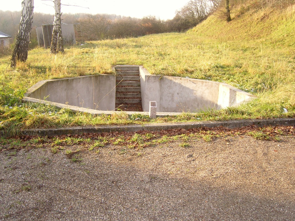 puits de mine de charbon berceau du charbon Lorrain 1816 a 1841